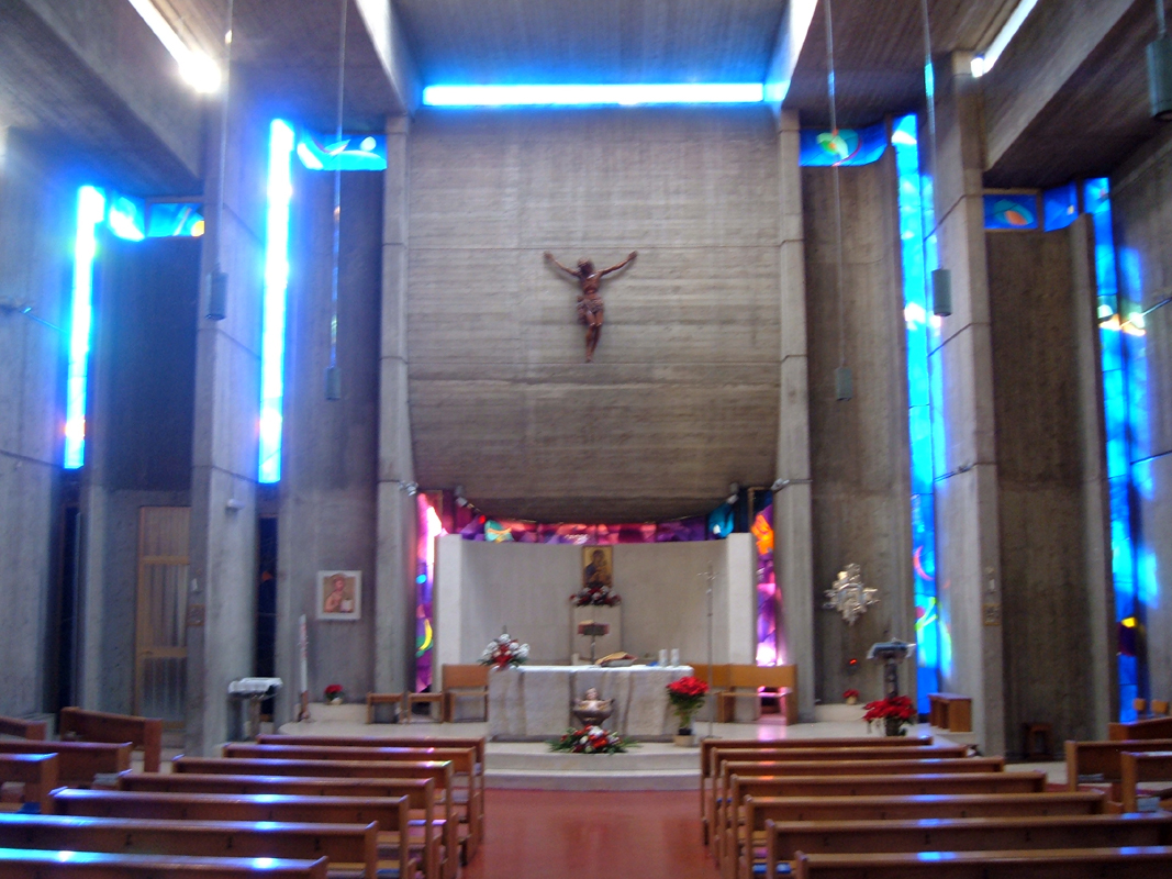 Chiesa del Santo Nome di Maria, a Roma, nel quartiere Appio Latino. Interno: altare maggiore.